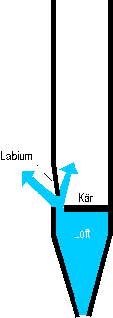 schematesche Längsschnett duerch eng Labialpäif